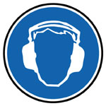 Pictogramme "Obligation du port d'équipement de protection auditive"